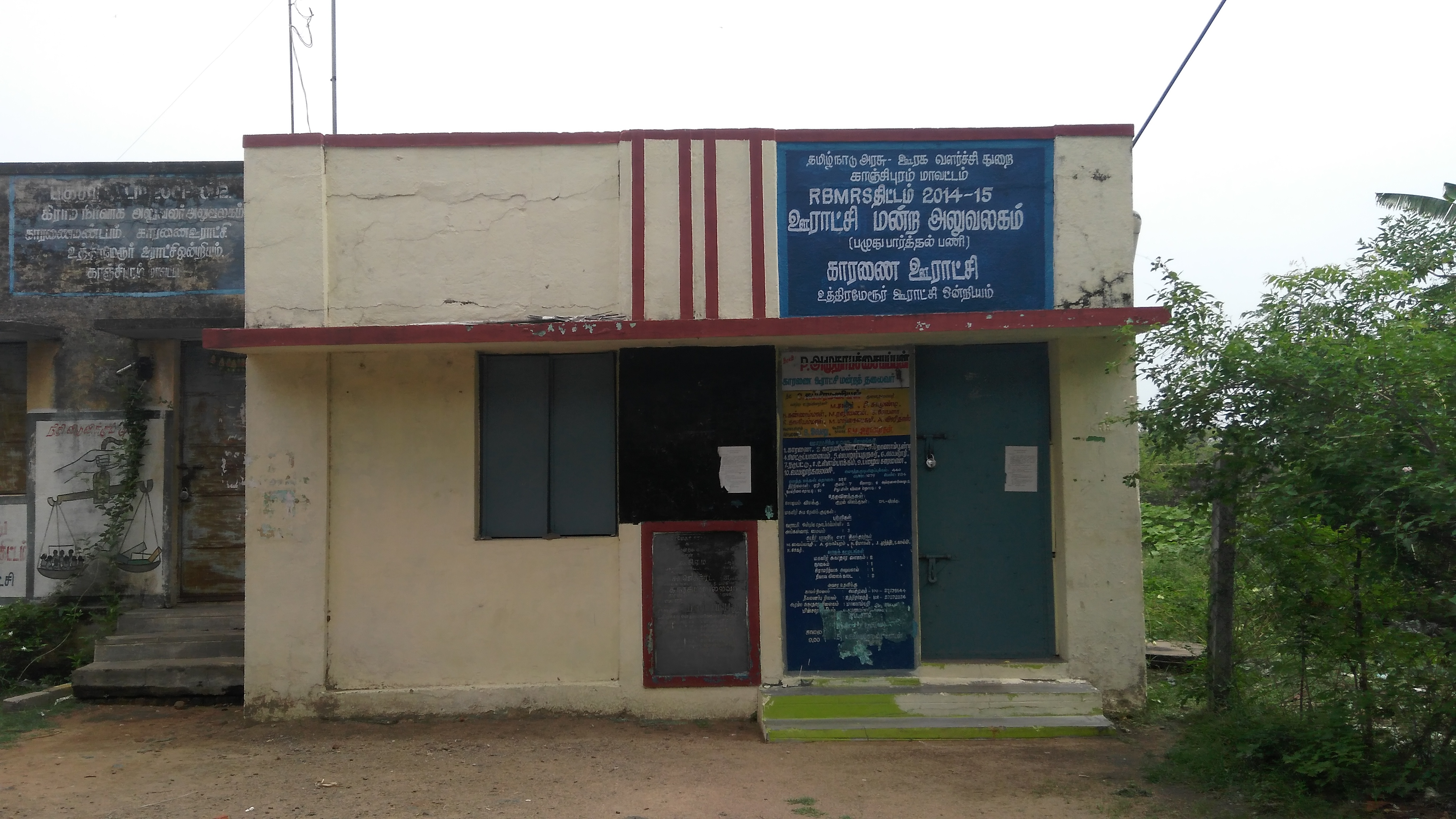 காரணை மண்டபம்